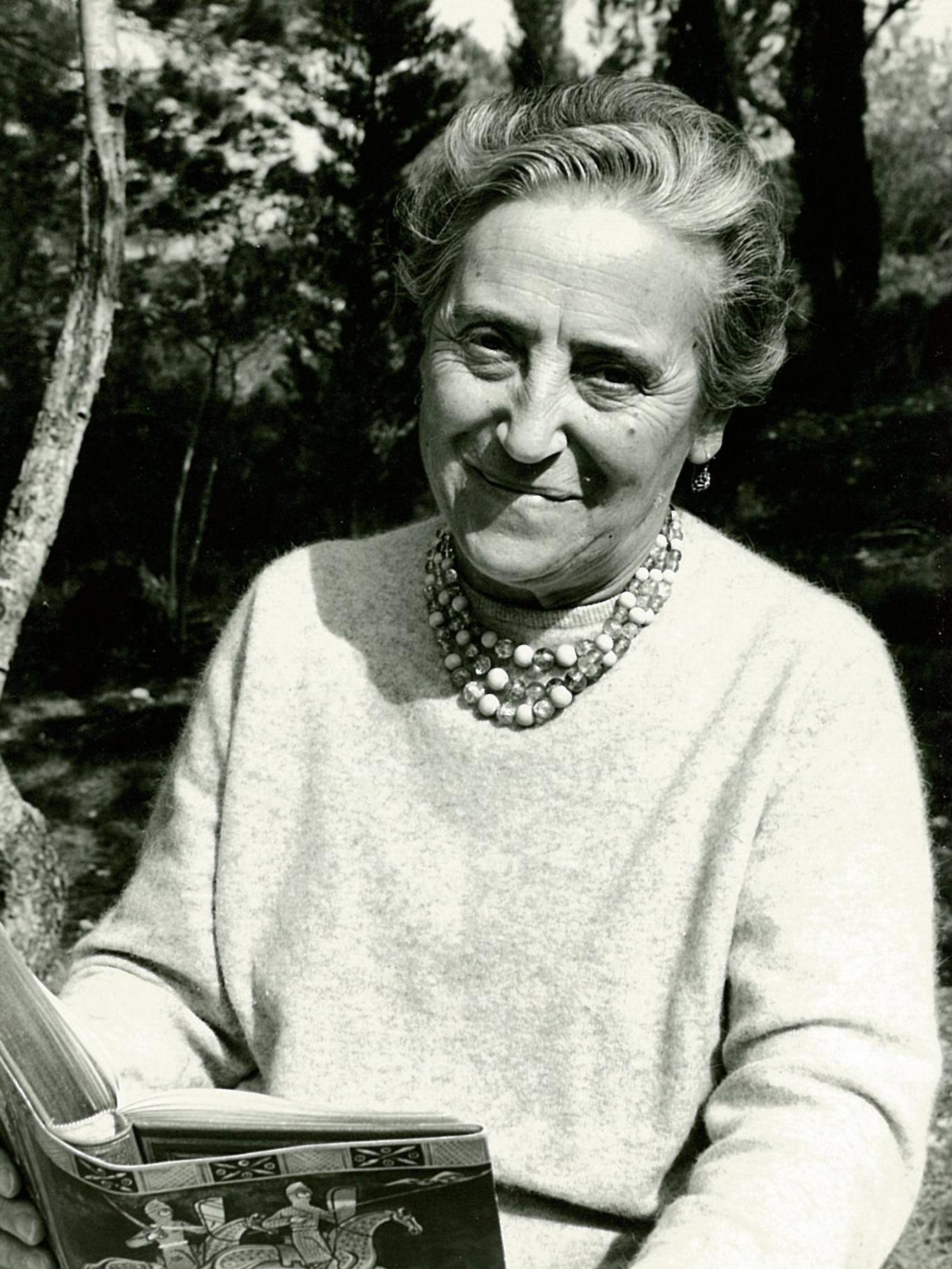 Marie Mauron, lisant en son verger, Saint-Rémy-de-Provence 1970